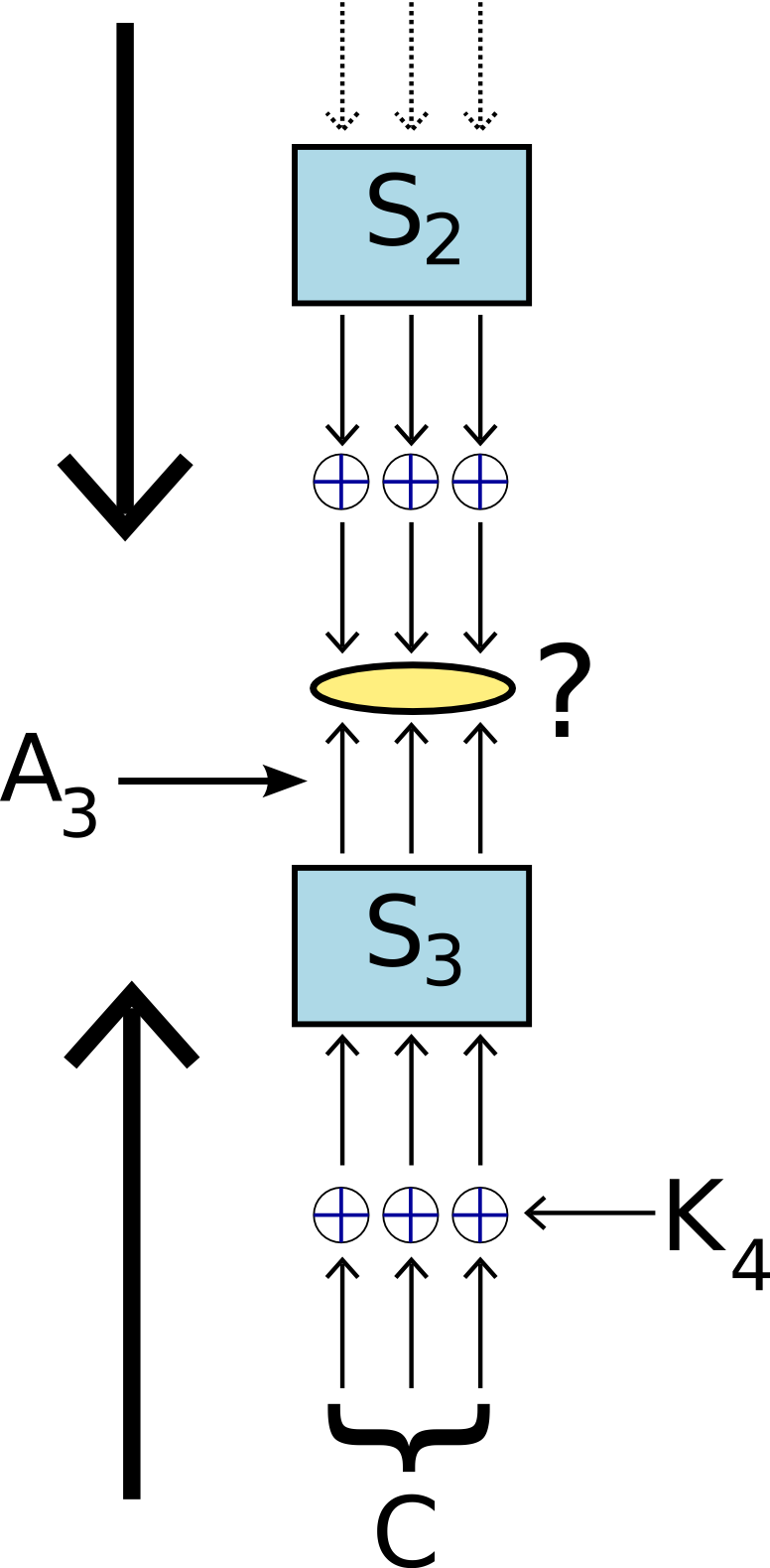 Chiffrement fictif pour l'article cryptanalyse linéaire.